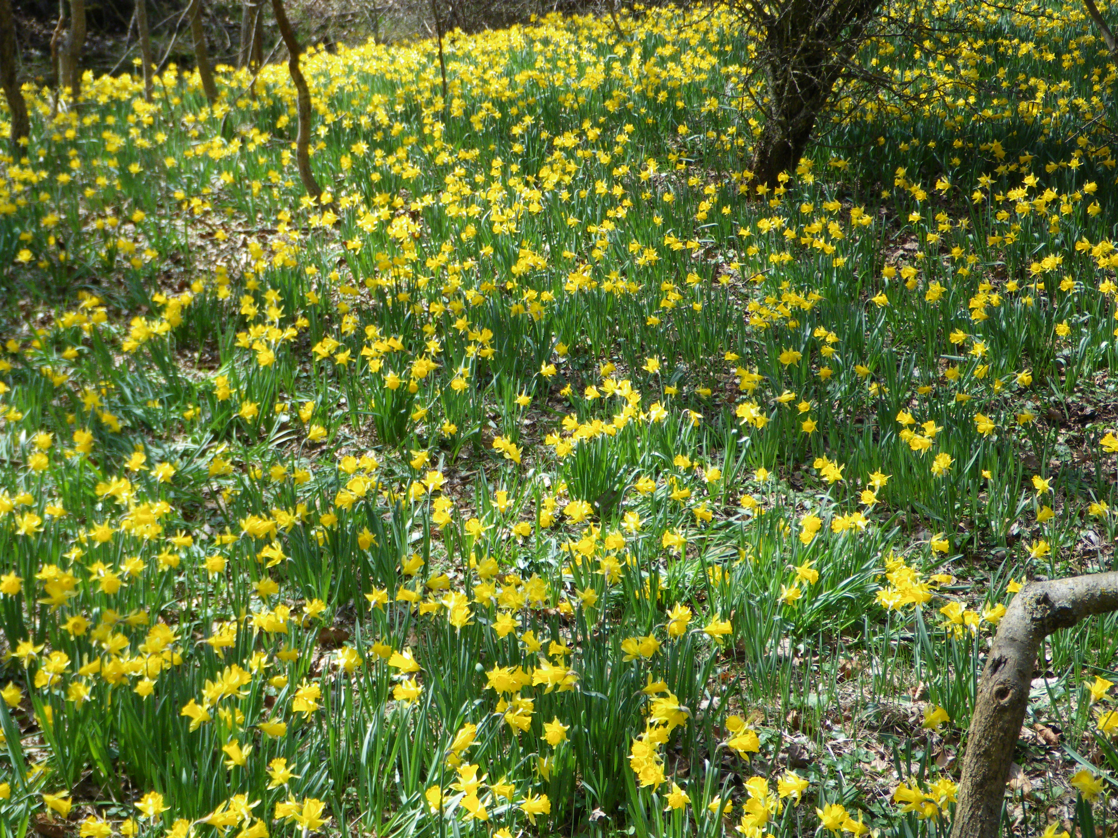 Narcissus eugeniae, hoz del río Talegones, Lumías, Soria, España.